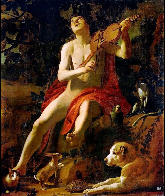 Cuadro basado en el mito de Orfeo. Mitología griega.